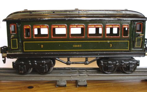 Marklin personenrijtuig 18880